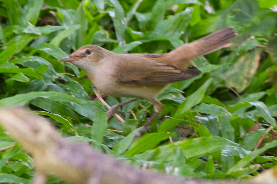 Iduna opaca, Maroau, Cameroon